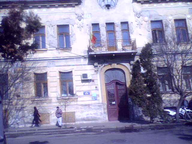 Casă în ARAD din 1905- Piața Mihai Viteazul 10.